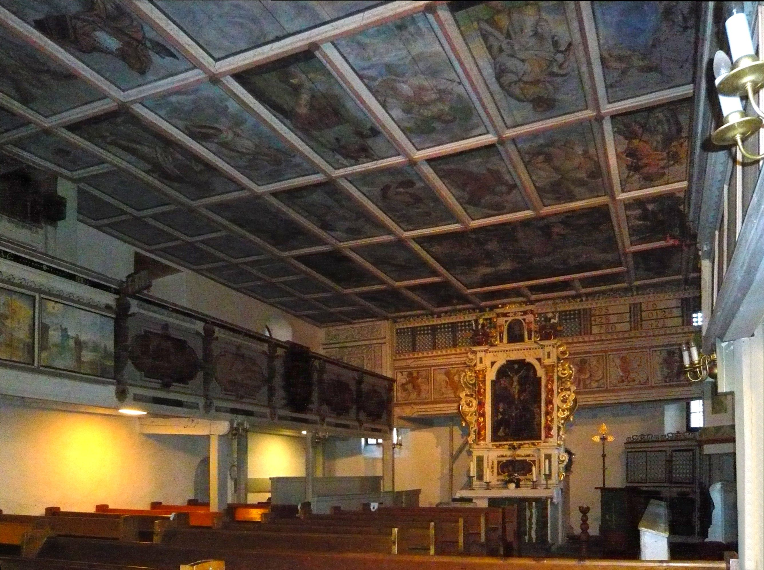 Dorfkirche Schellerhau, Hauptraum mit blick Richtung Altar